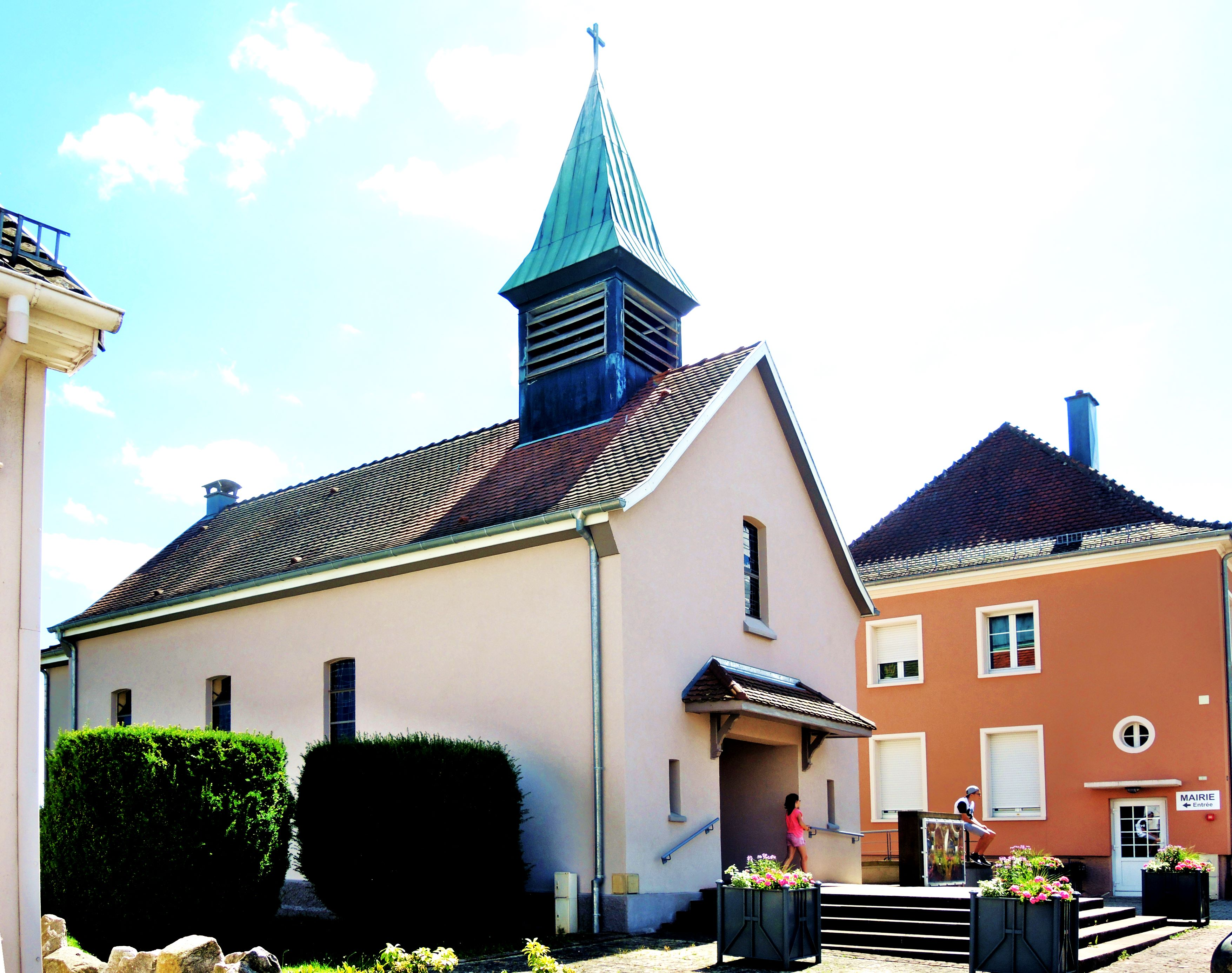 Eglise Sainte Agathe, à Michelbach. Haut-Rhin